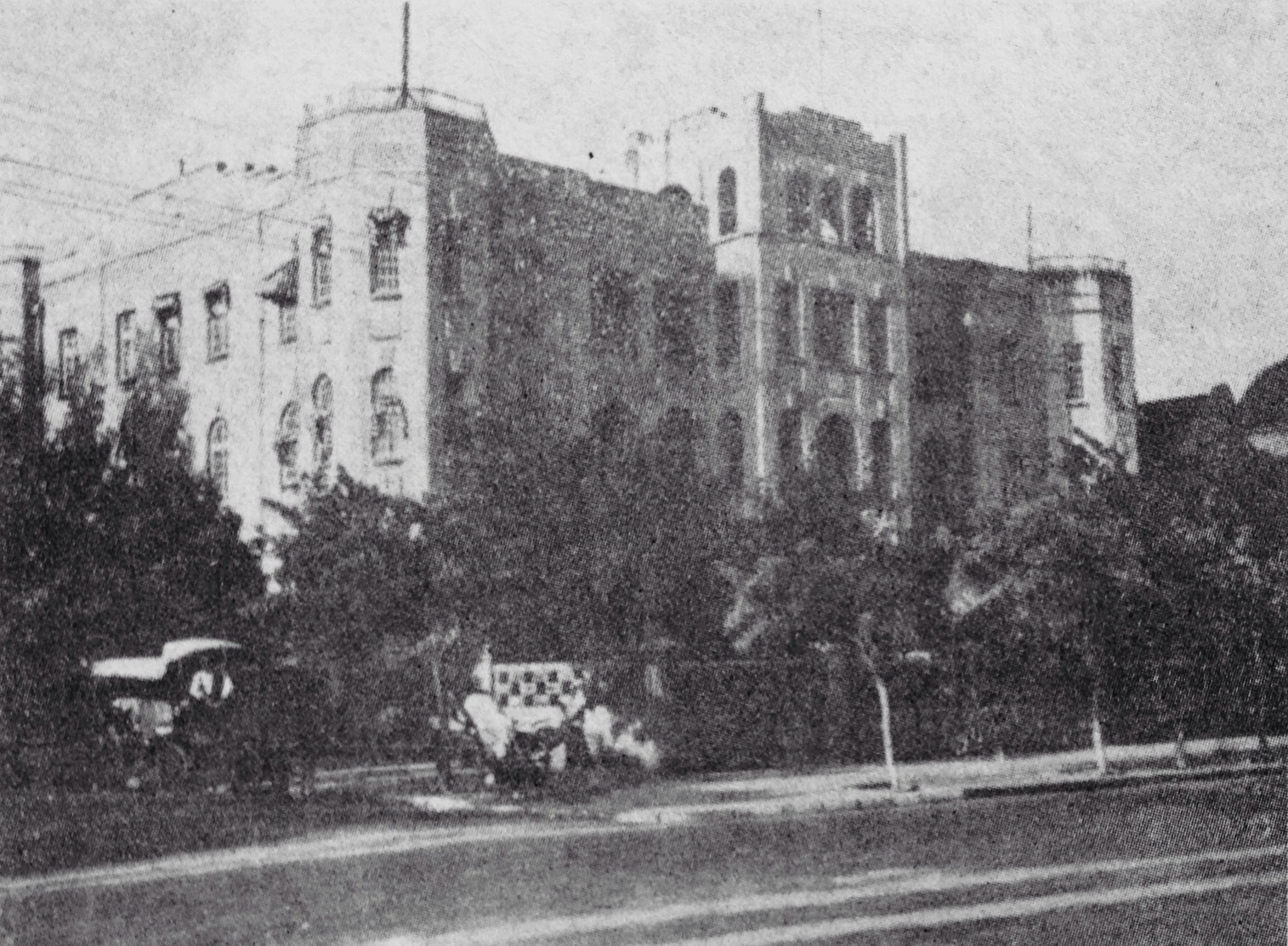 兴亚院华北联络部青岛出张所